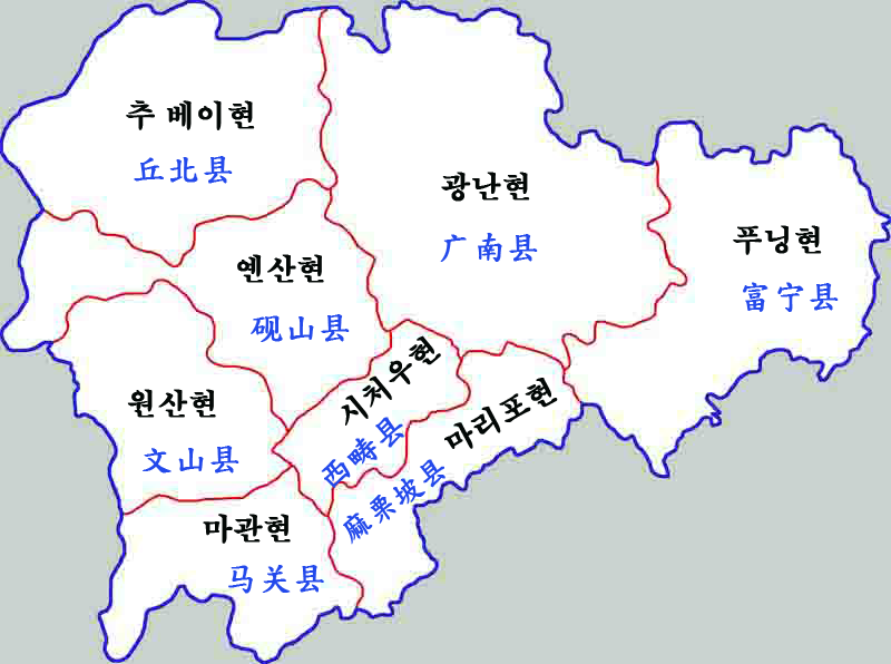 원산 장족 먀오족 자치주 현급구역도